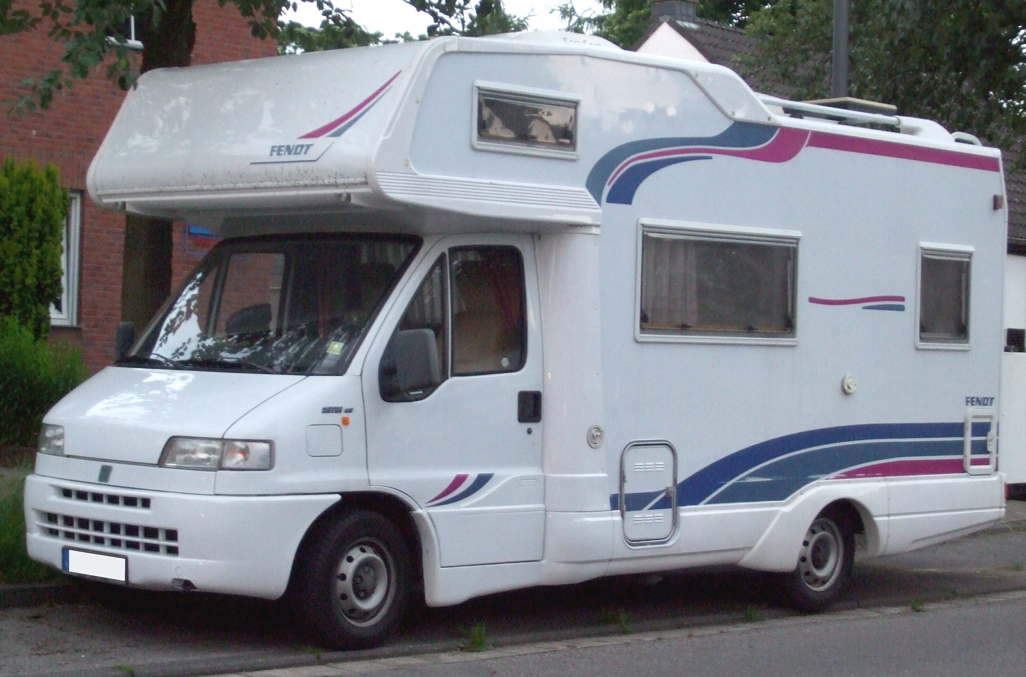 Fendt-Wohnmobil auf Basis eines Fiat Ducato Transporters.